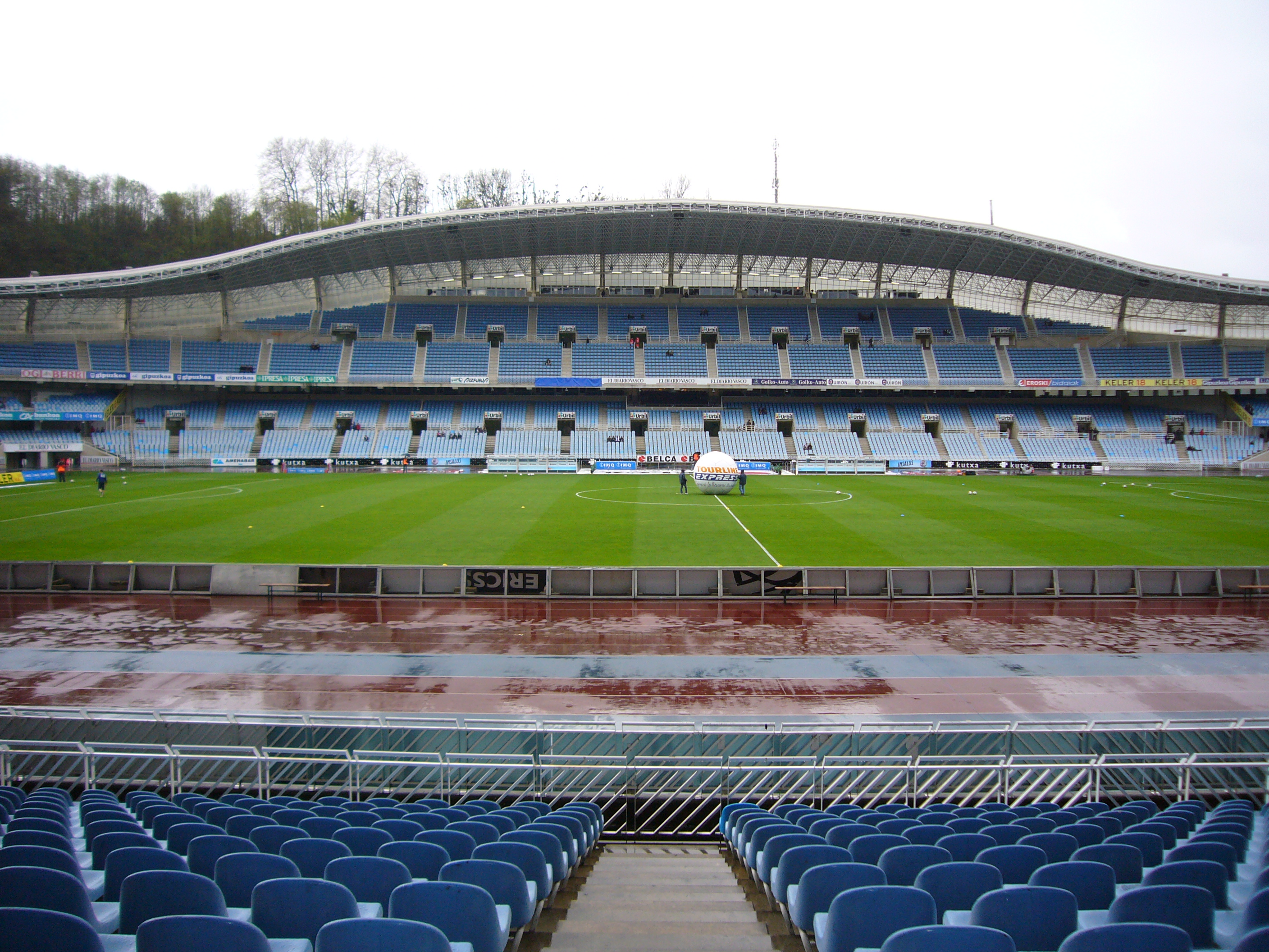 Vista del Estadio Anoeta con la tribuna oeste al frente, previo al encuentro de Segunda División frente al Hércules Club de Fútbol, el 4 de abril de 2010.